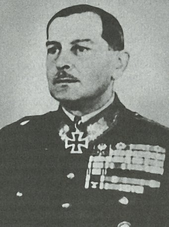 Jány Gusztáv (1883–1947) vezérezredes, a Donnál harcoló 2. magyar hadsereg parancsnoka